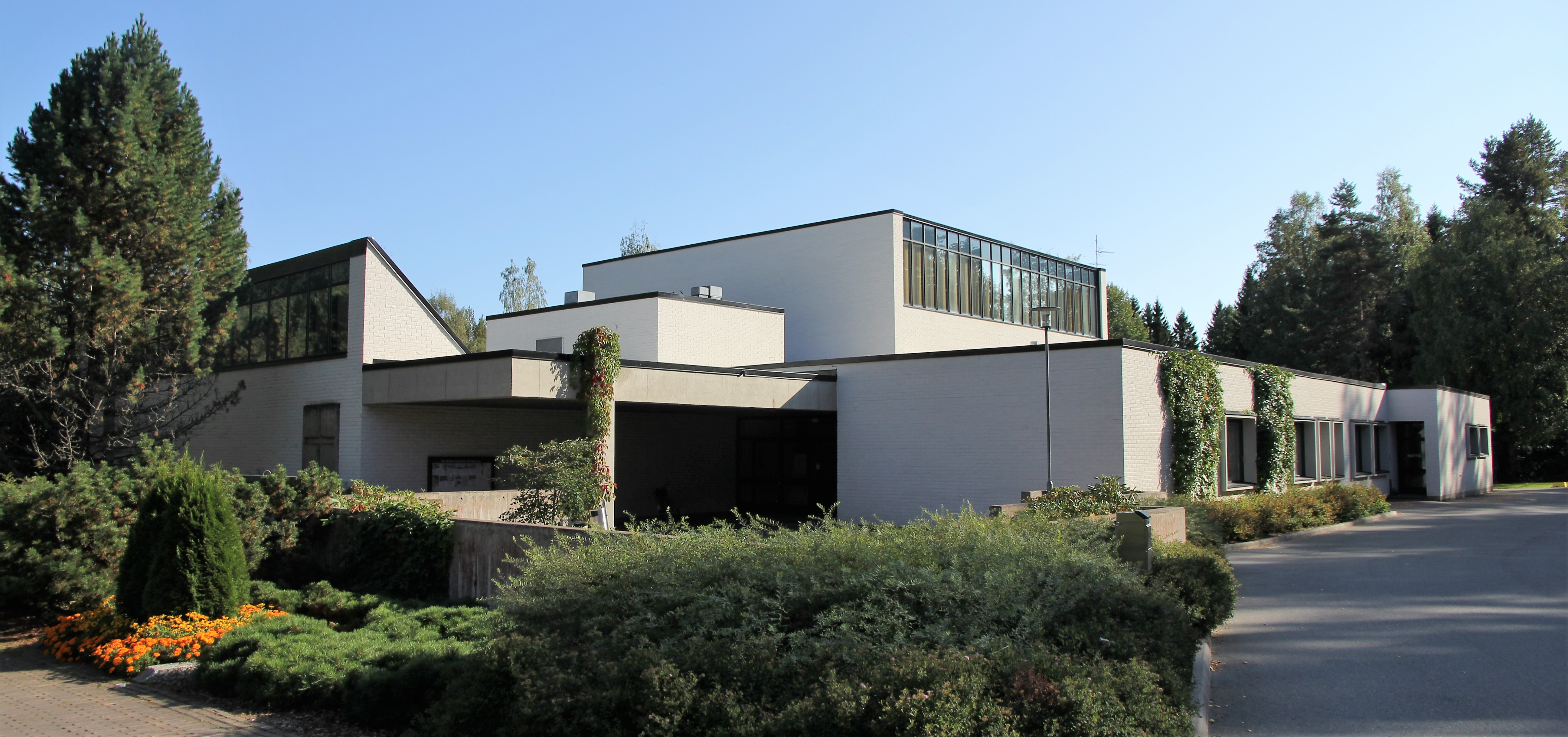 Arkkitehti Pertti Pakkalan suunnittelema Kallaveden kirkko (1983), Rauhalahdentie 21, Kuopion Jynkän kaupunginosassa